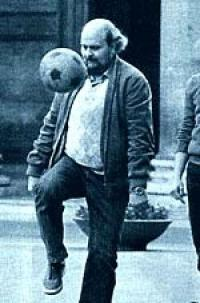 Osvaldo Soriano, circa 1981